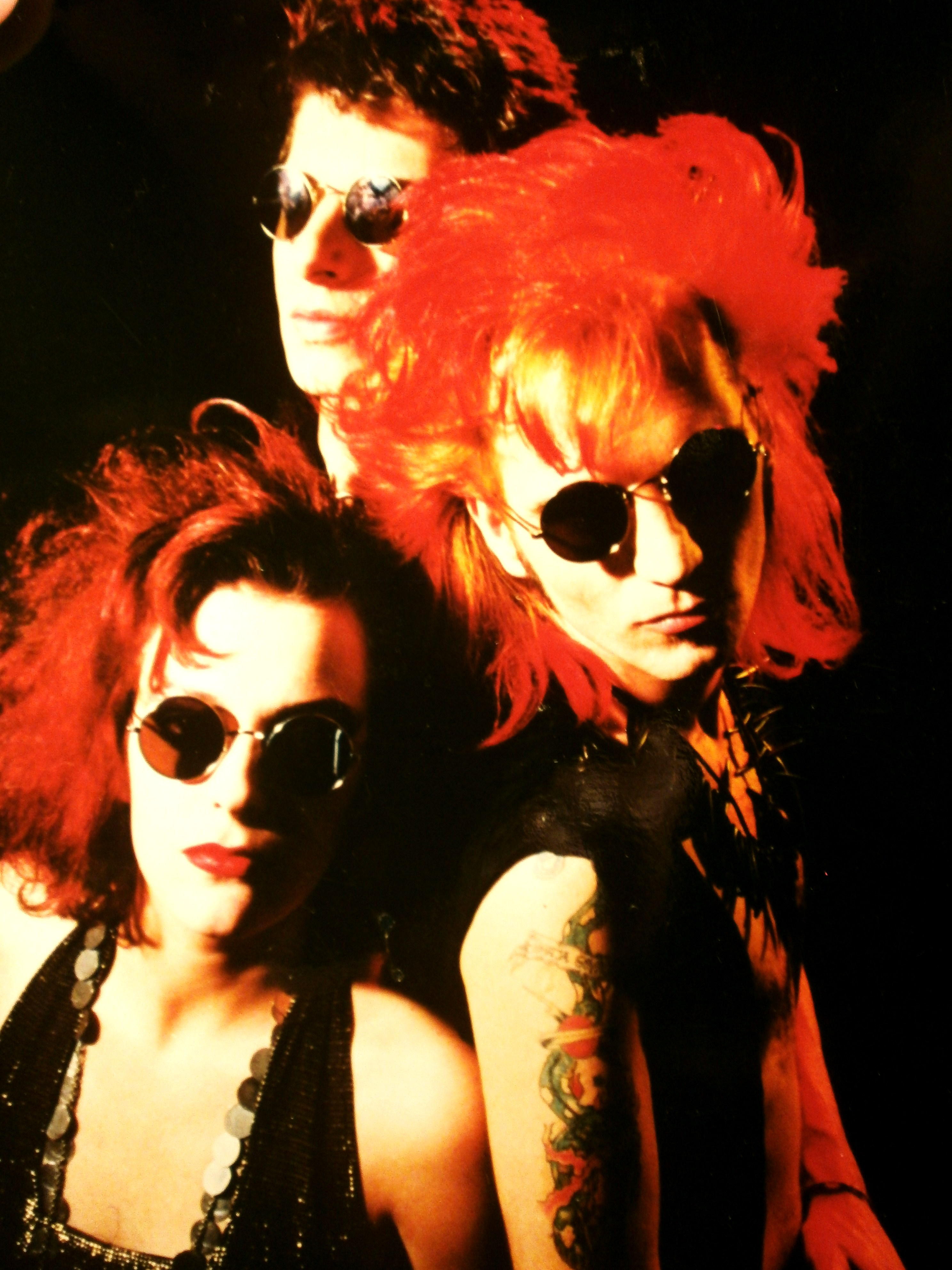 Marionetz1991 Marion Ätz, Sigi Pop, Early Ledder